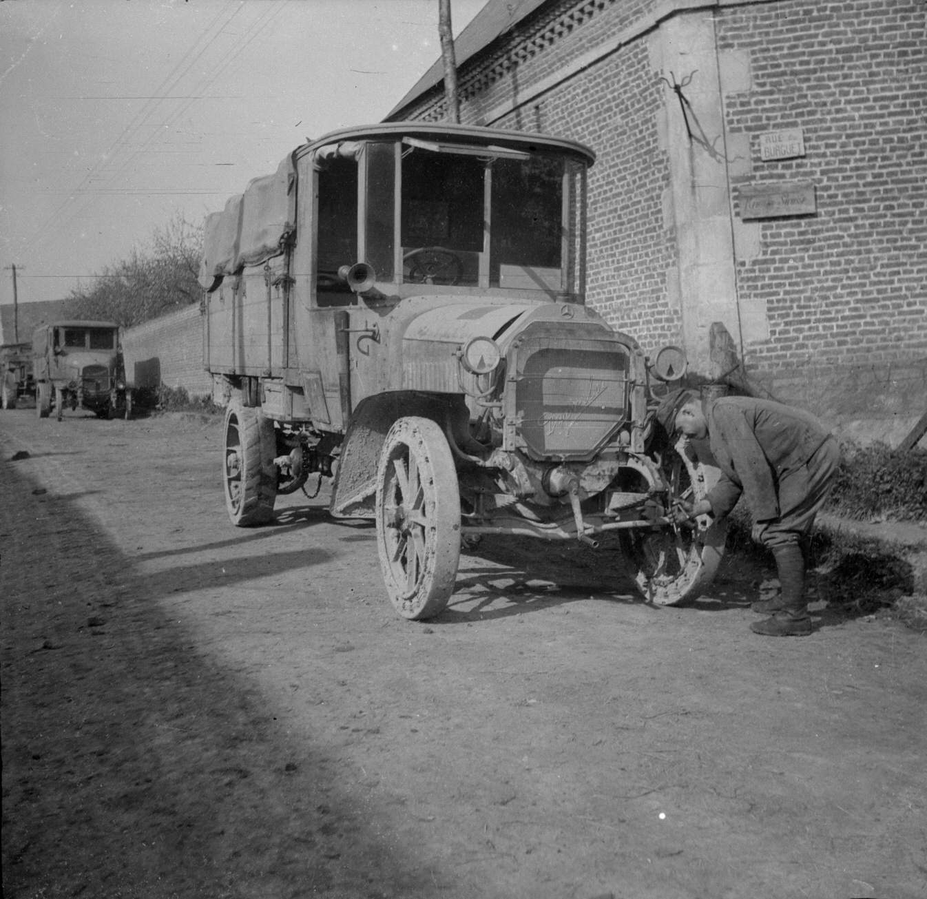 A truck from Daimler.